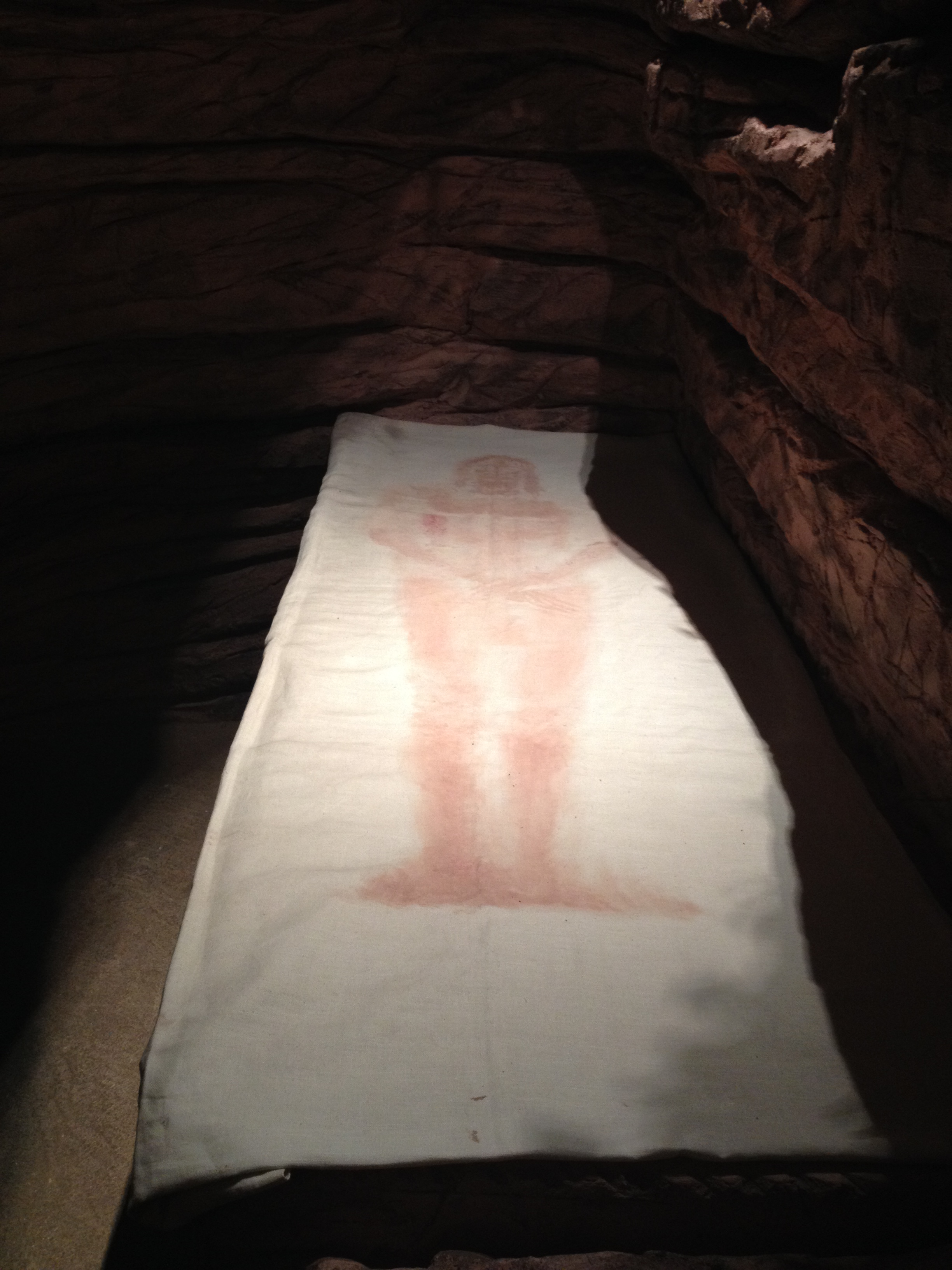 Sepolcro